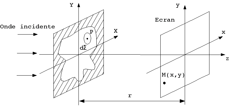 Schéma illustrant les notations utilisées pour le principe de Huygens-Fresnel.